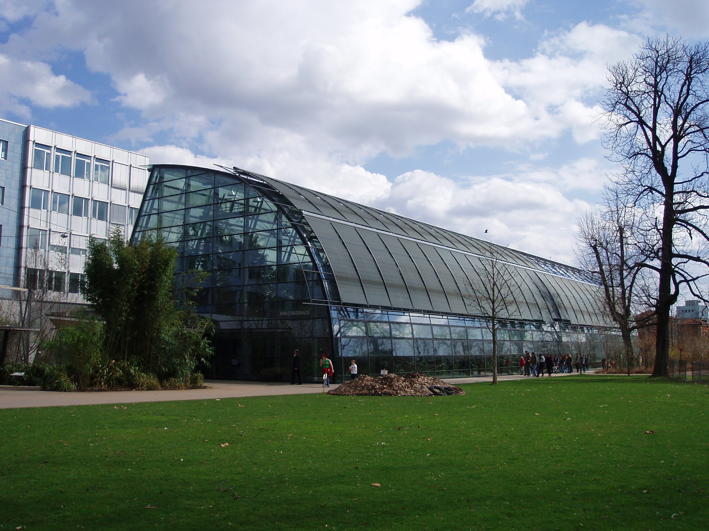 Das Amazonien - Haus in der Wilhelma in Stuttgart.